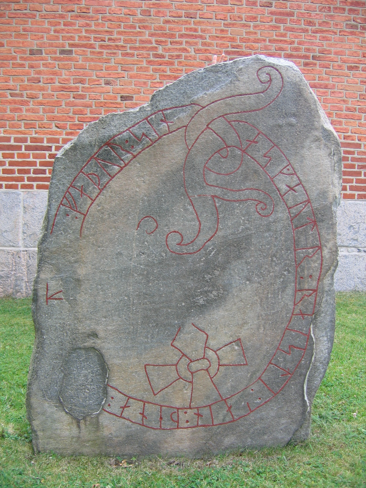 Runestone